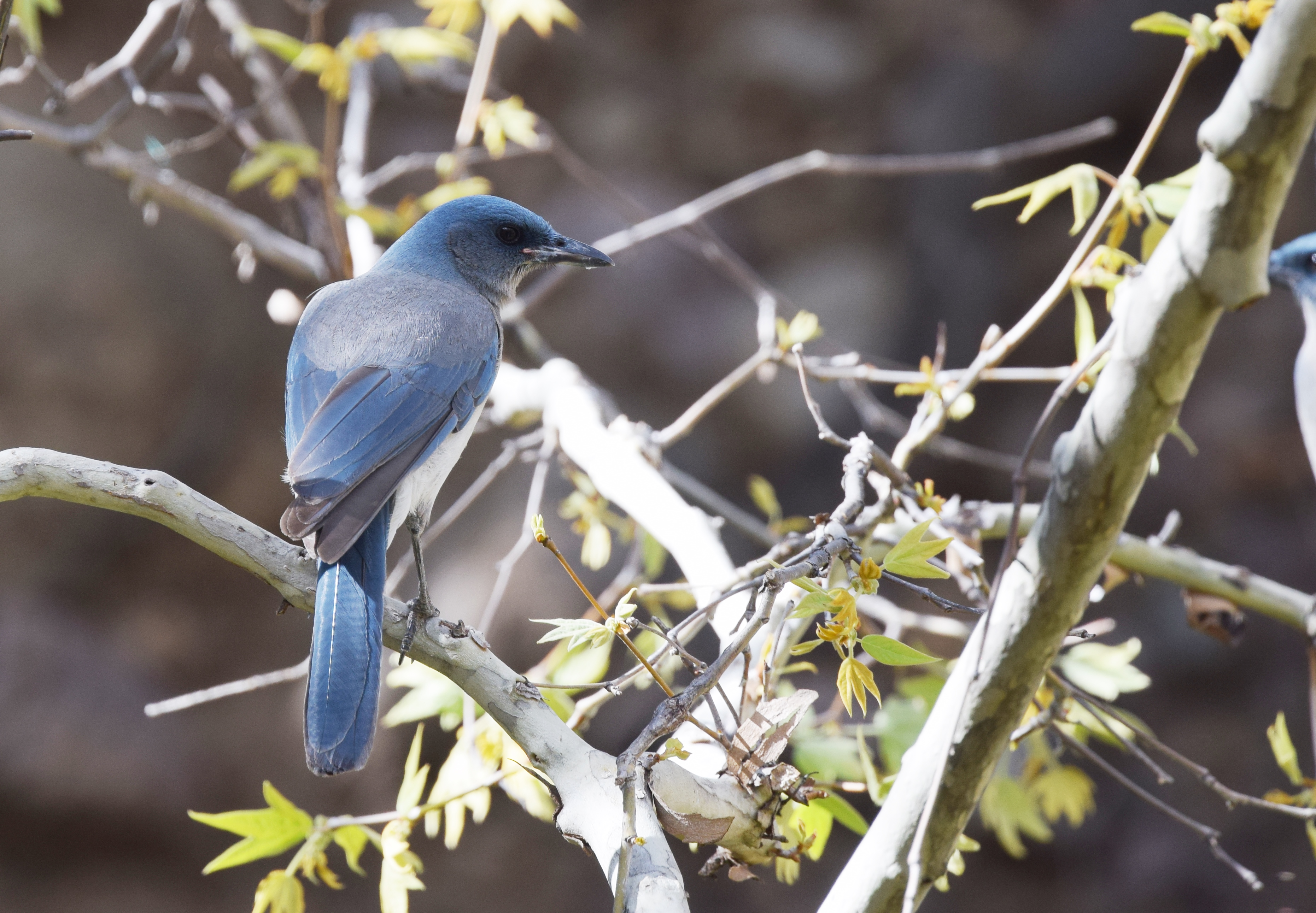 Arizona 4/4/17